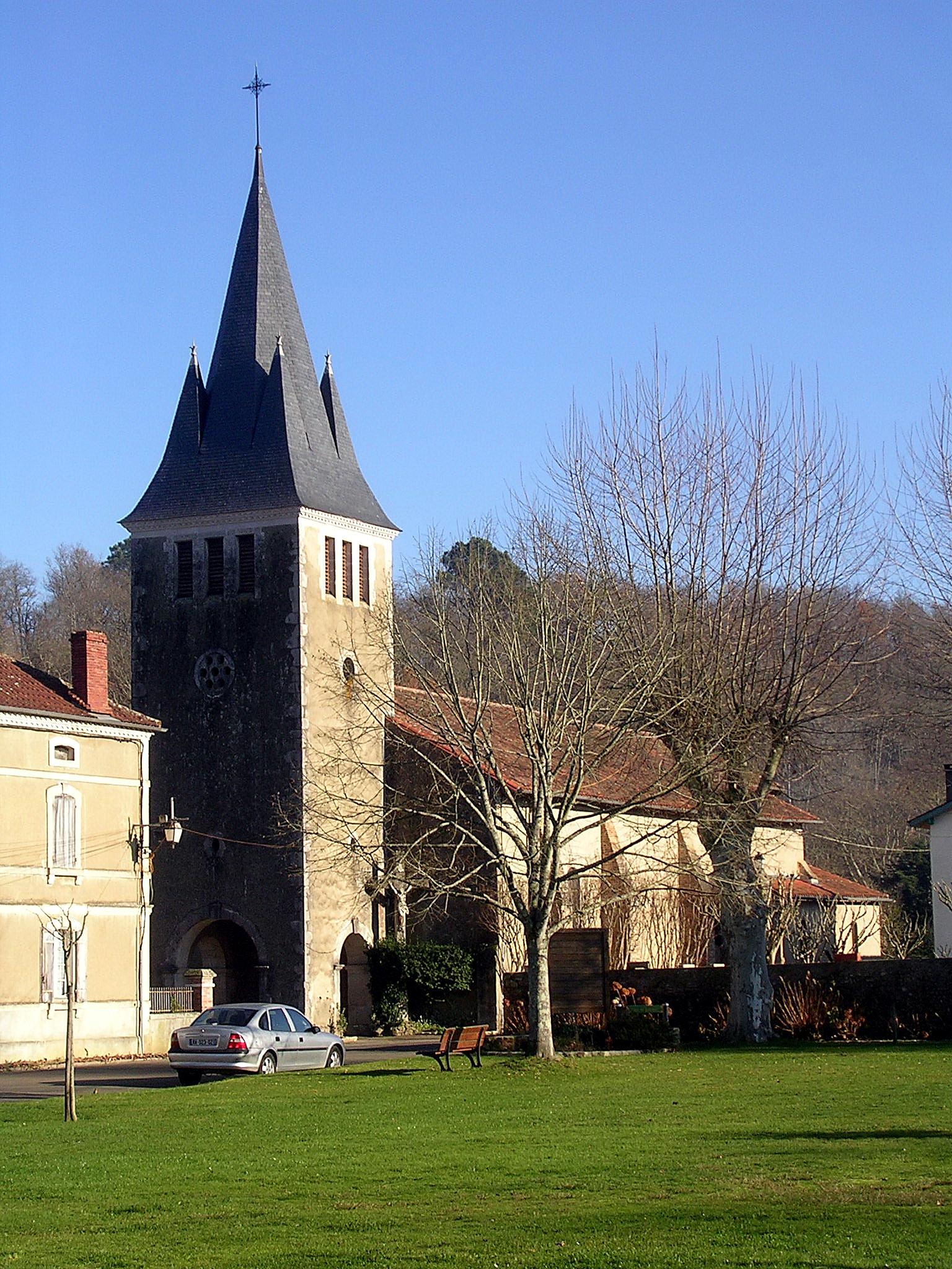 Église Saint-Leu de Duhort, à Duhort-Bachen (Landes, France)